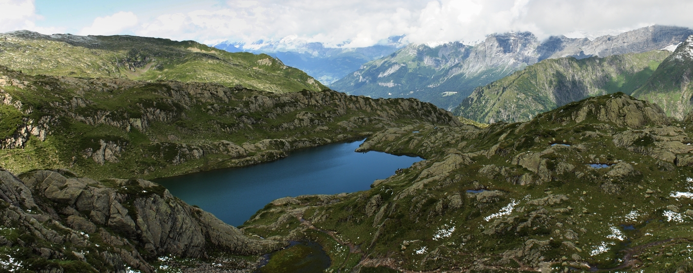 lake brevent, mt brevent.